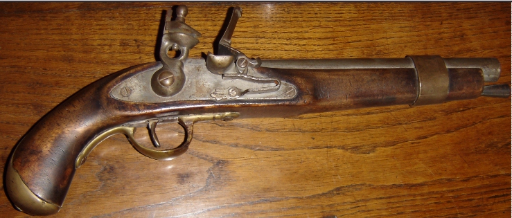 My Picture ( Lax) copie espagnole (Jukar) d'un Pistolet à Silex